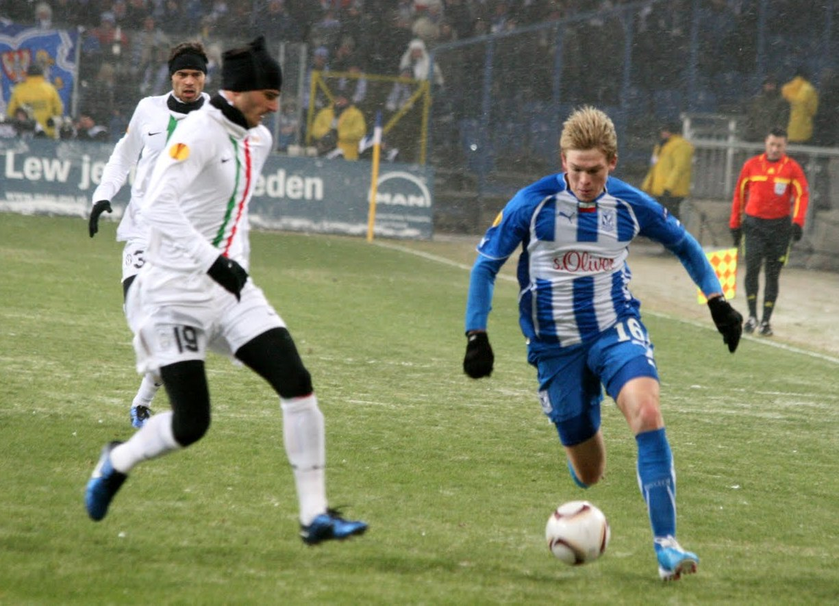 Artjoms Rudņevs (Lech Poznań) against Leonardo Bonucci (Juventus).